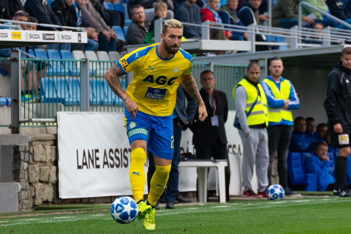 David Vaněček vs FK Mladá Boleslav